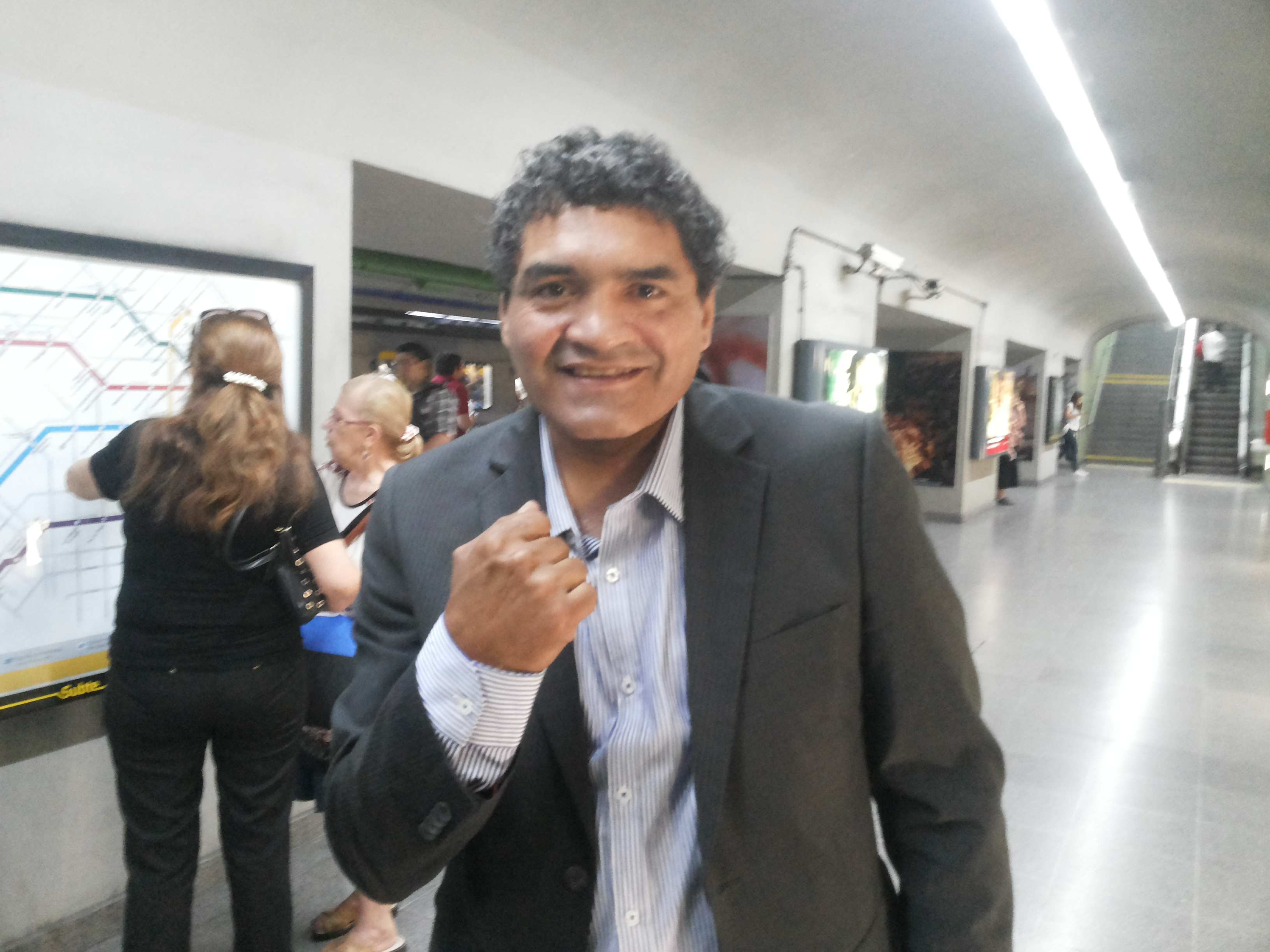 Jorge Fernando "Locomotora" Castro, también conocido como "Roña" Castro, es un boxeador argentino, campeón mundial de la categoría "Middle / Medio (69 - 75 kg)".